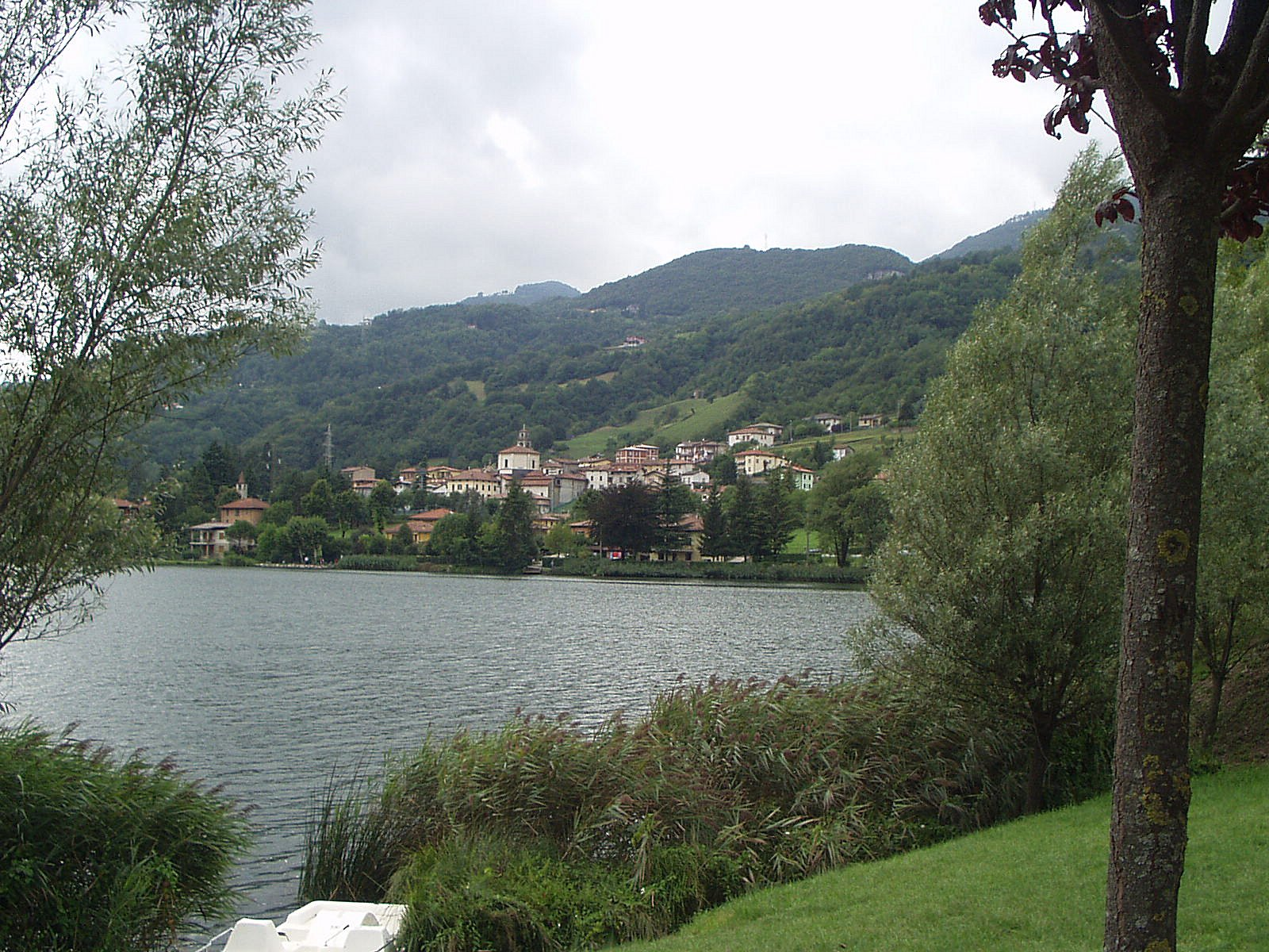 Spinone al lago vista dalla riva di Monasterolo del Castello